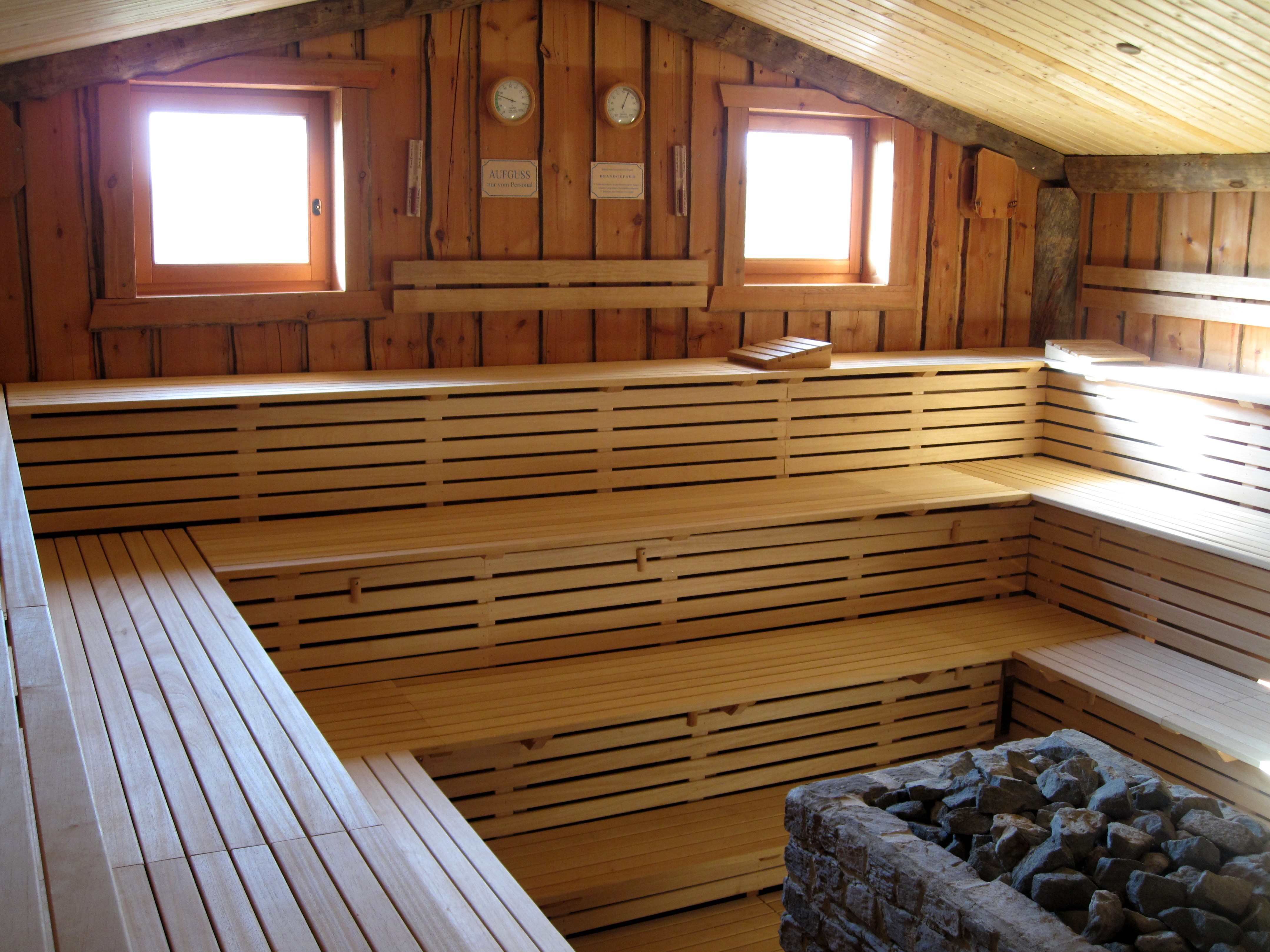 „Galeriesauna“ in der NaturTherme Templin, Templin, Land Brandenburg, Deutschland